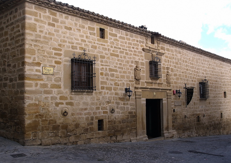 Palacio de las Manillas, en Sabiote (Jaén, España)